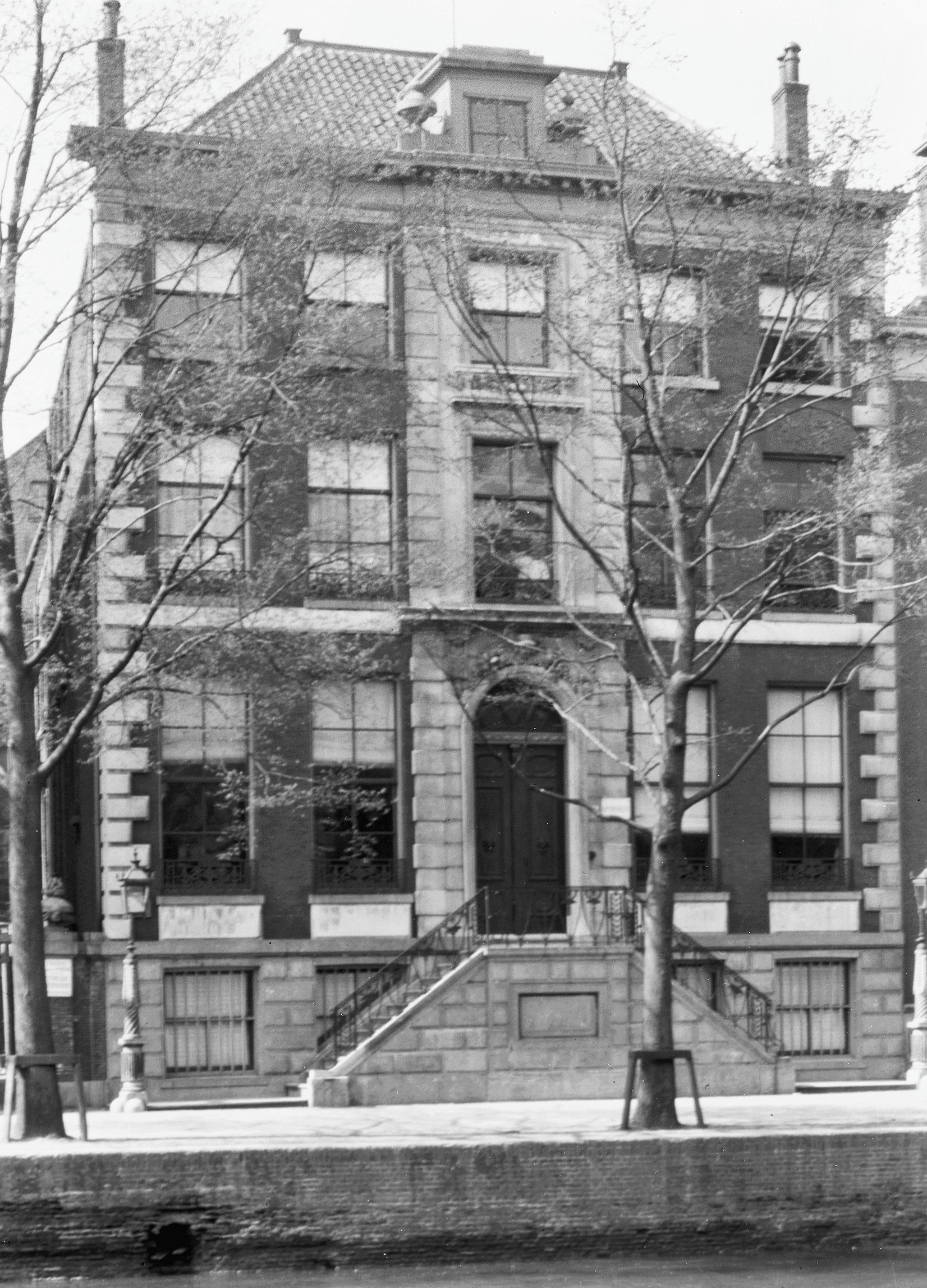 Huis Nolet: Overzicht van de voorgevel